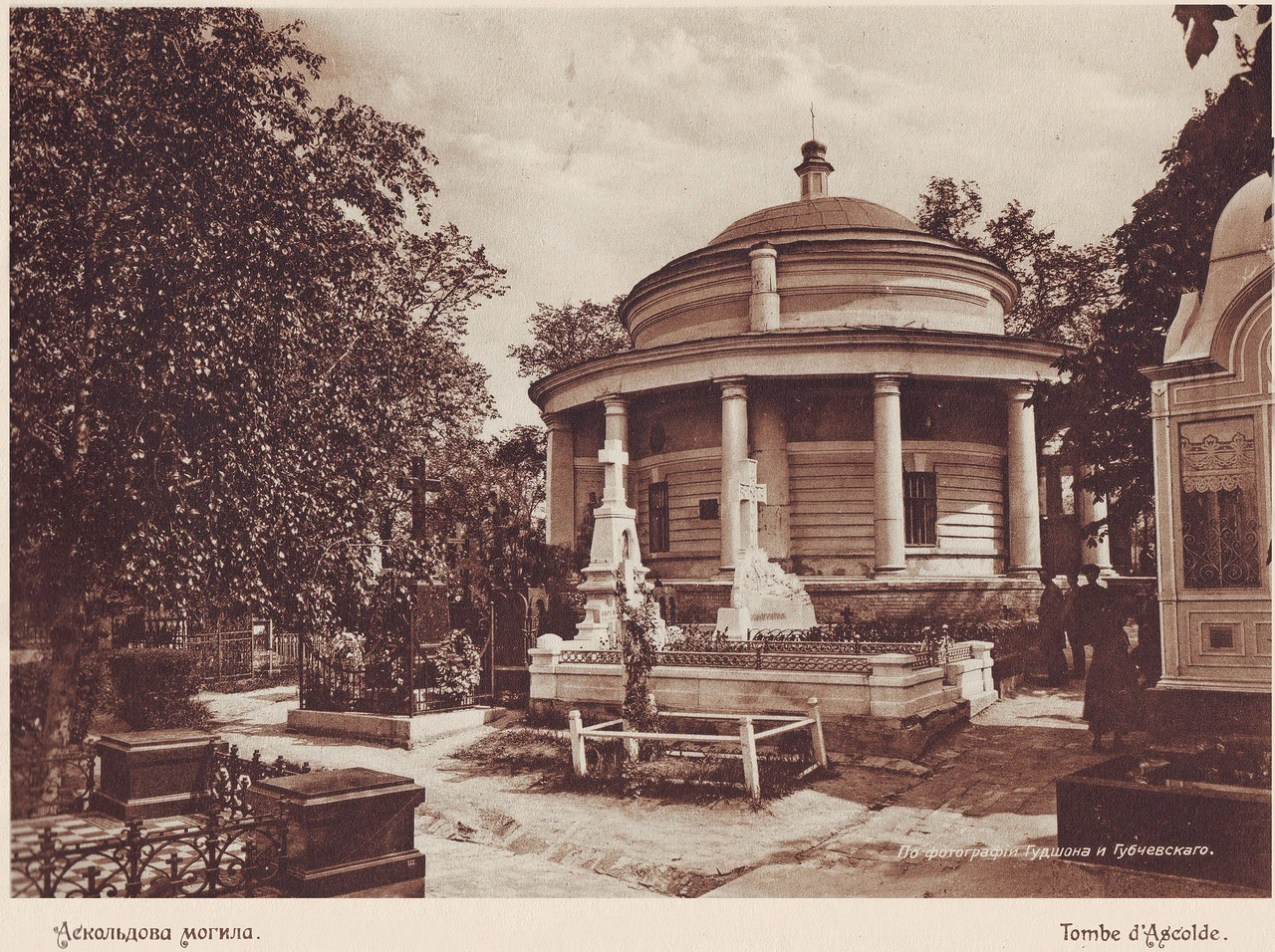 Аскольдова Могила Київ (Grave of Askold, Kyiv) 1911